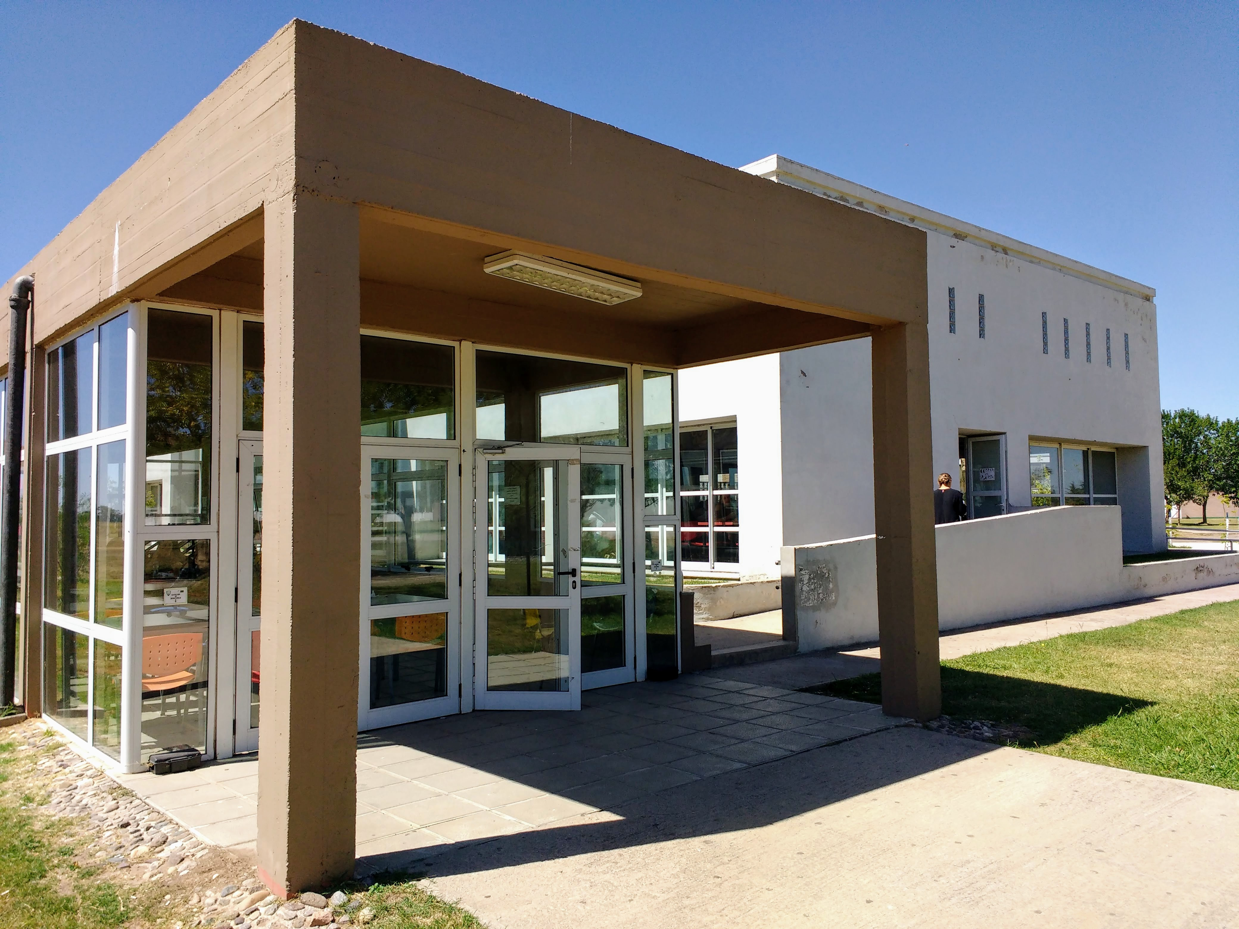 Comedor Universitario de la Universidad Nacional de Villa María, Córdoba, Argentina.